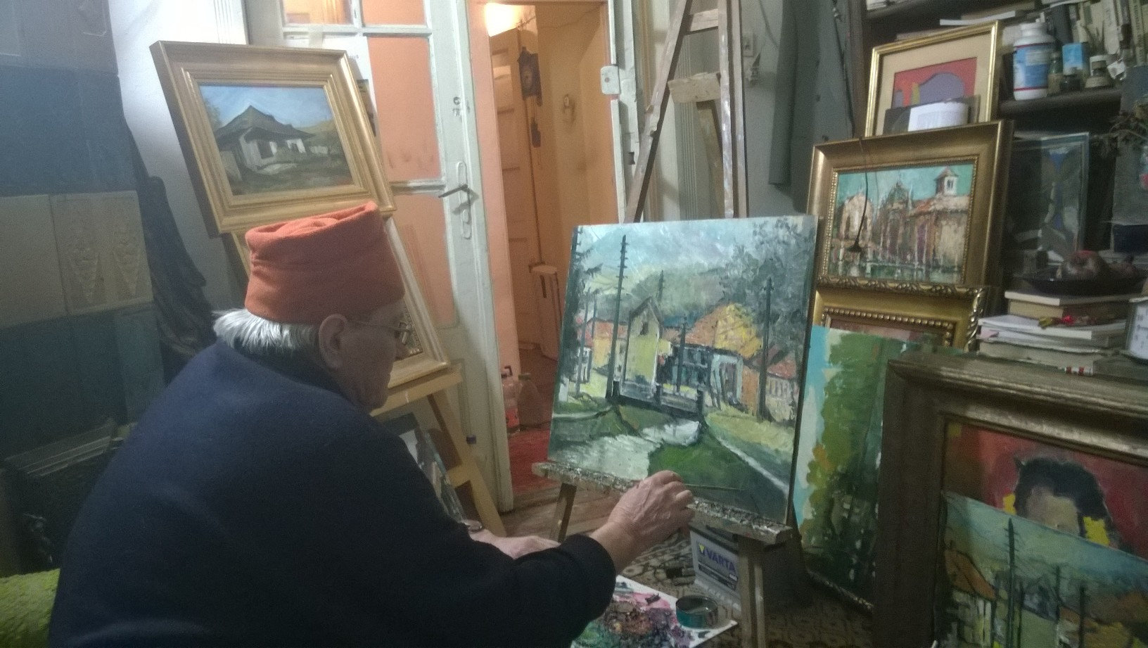 Pictorul Valeriu Pantazi în atelier la vârsta de 74 de ani.